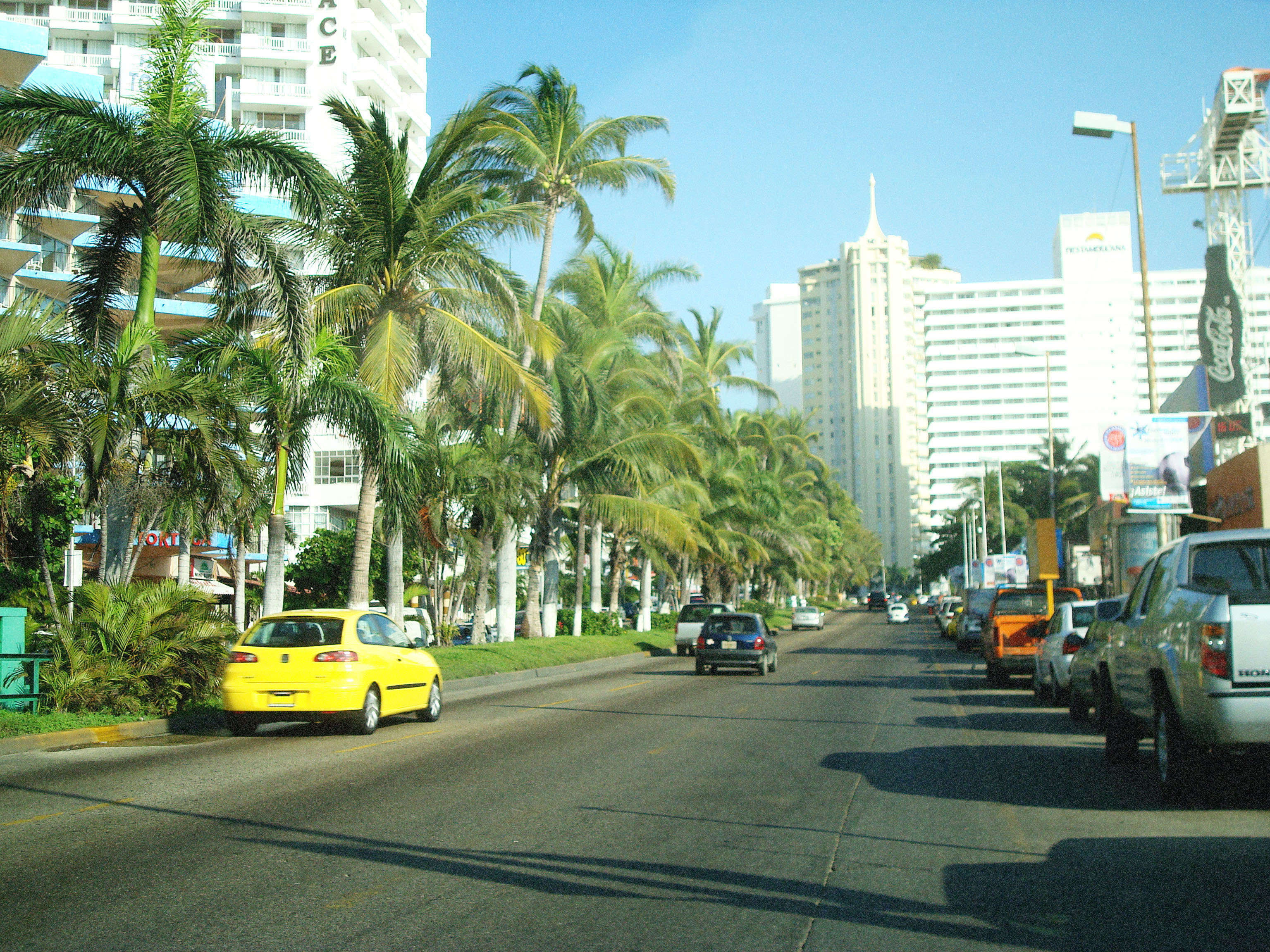 Avenida Costera Miguel Alemán, principal arteria vial de la ciudad y puerto mexicano de Acapulco.